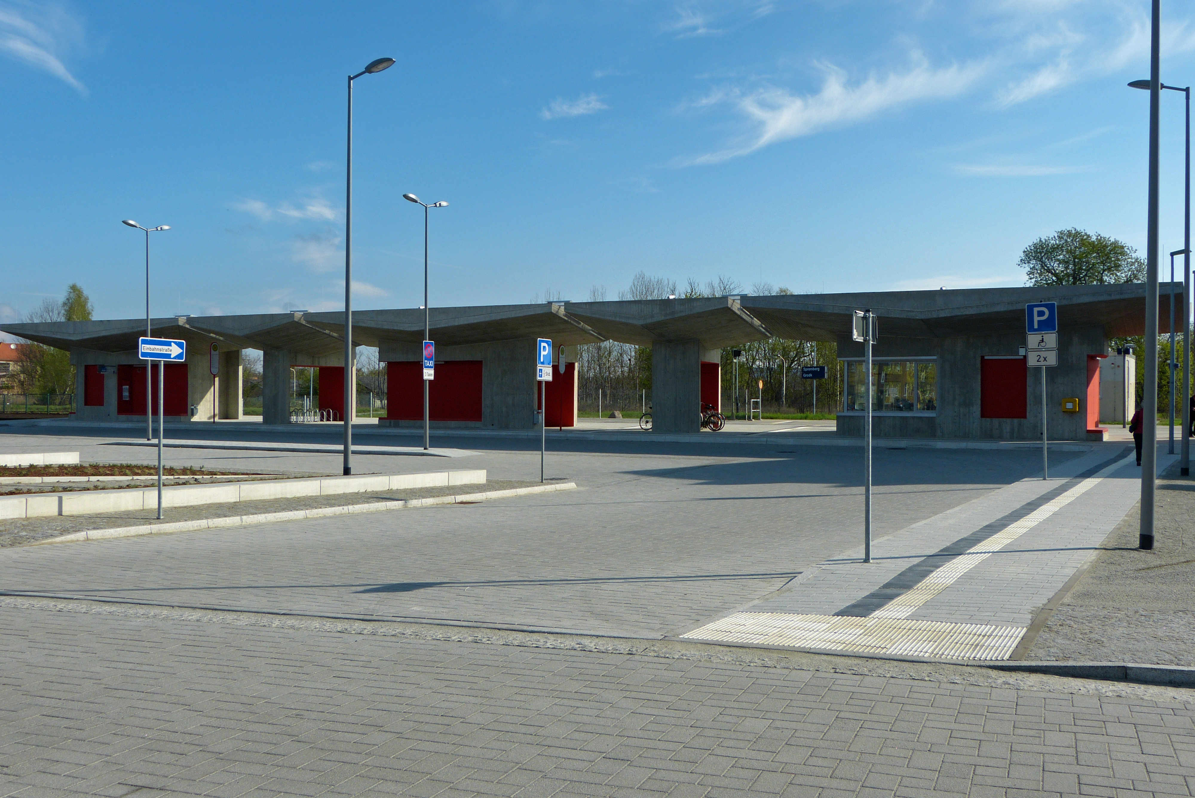 Neues Verknüpfungsbauwerk (offizieller Sprachgebrauch) neben dem alten, nicht mehr als solchen genutzten, Bahnhof Spremberg